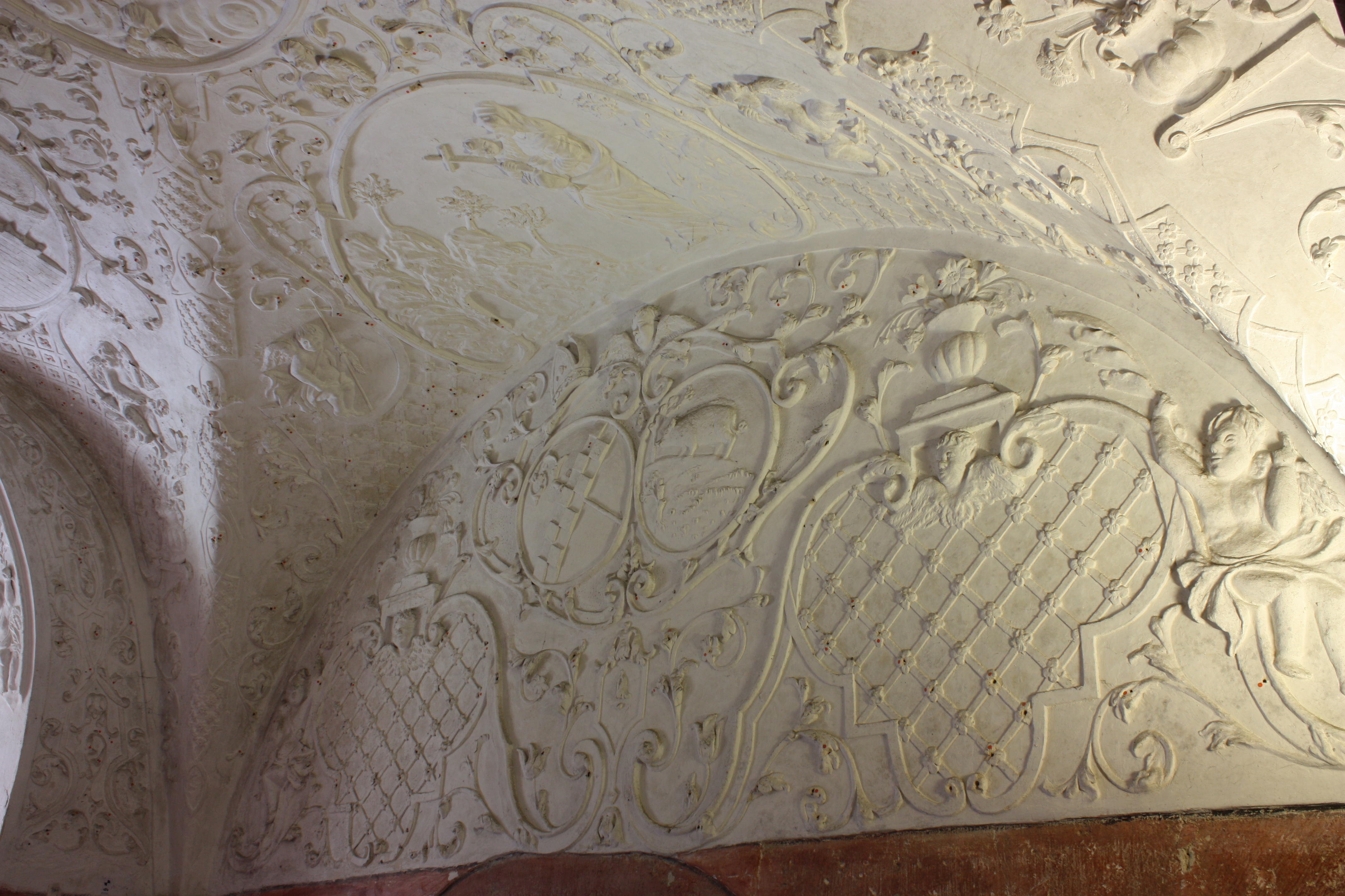 Stuckarbeit des Klosterwappens in einer Seitenkapelle der Basilika des Klosters Eberbach